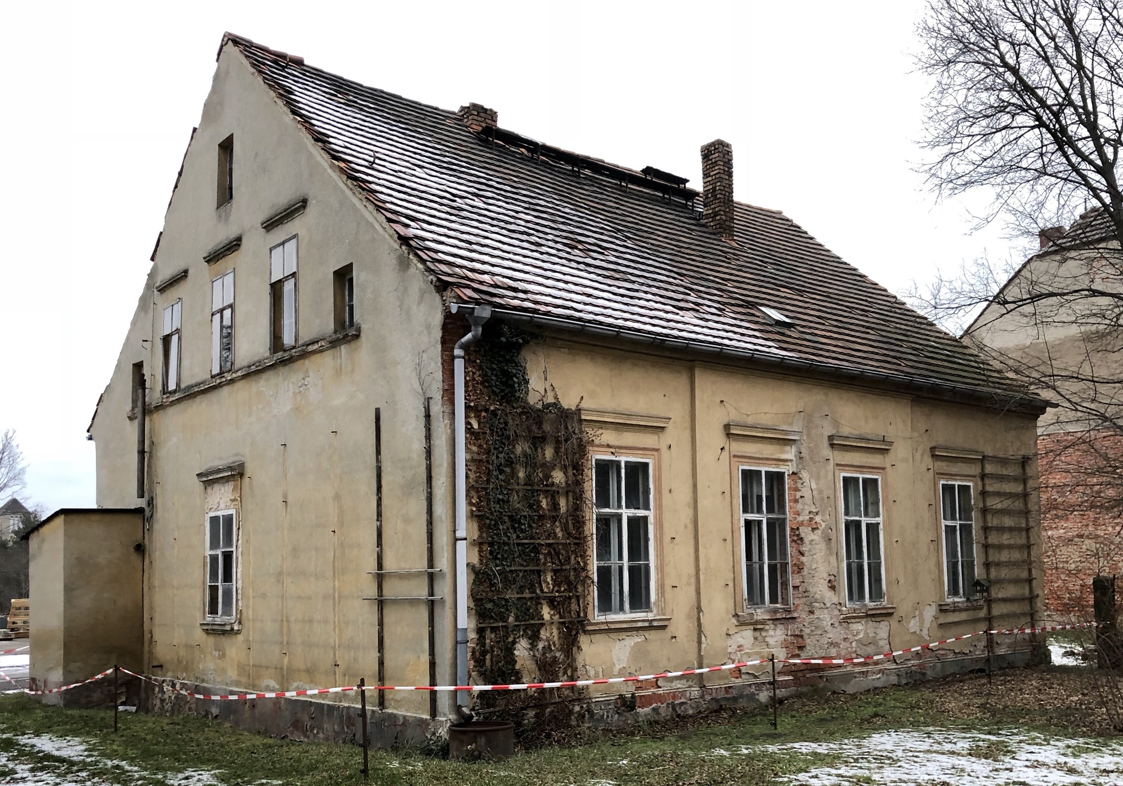 Torgauer Straße 48 in Annaburg